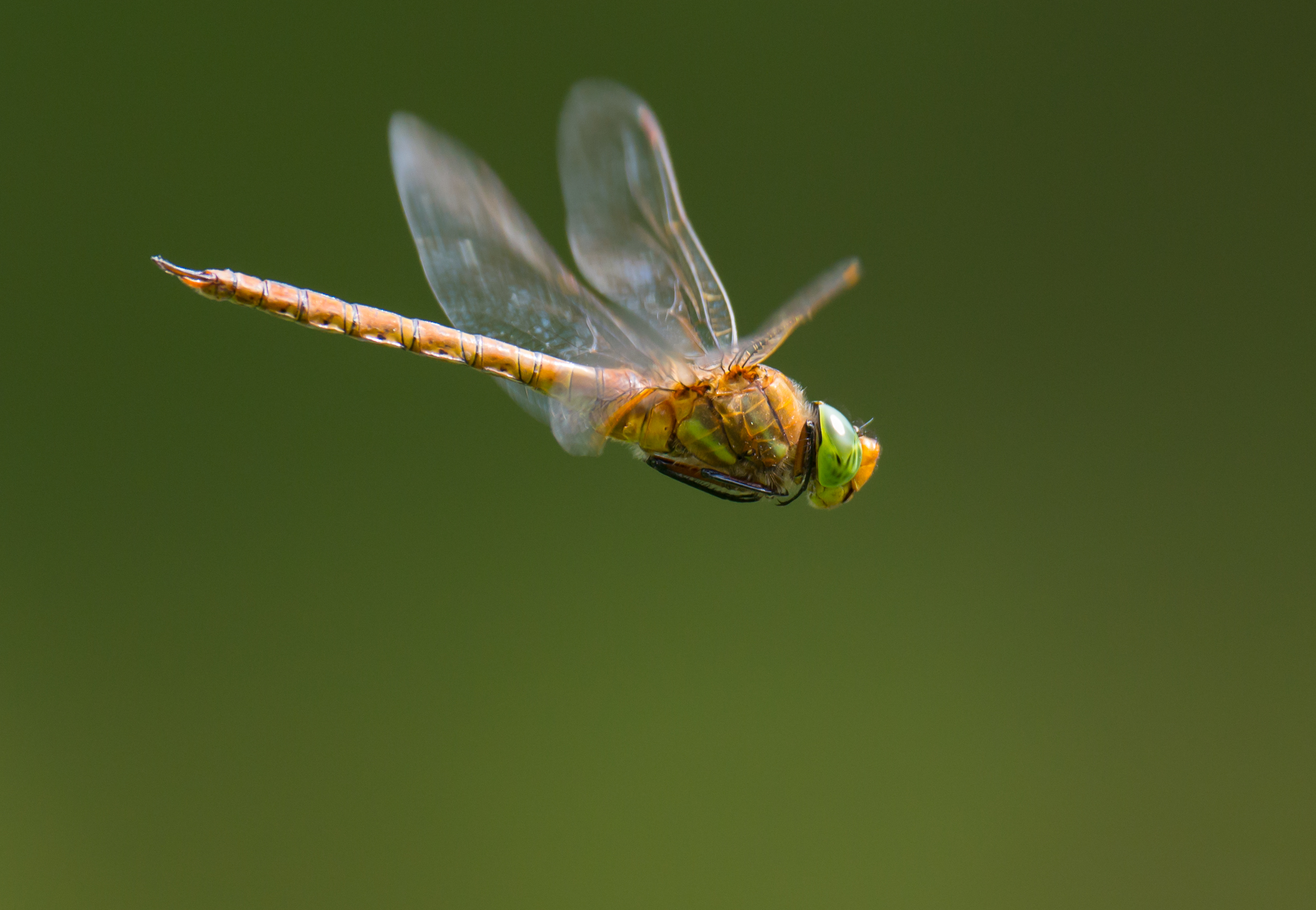 Vroege glazenmaker in vlucht